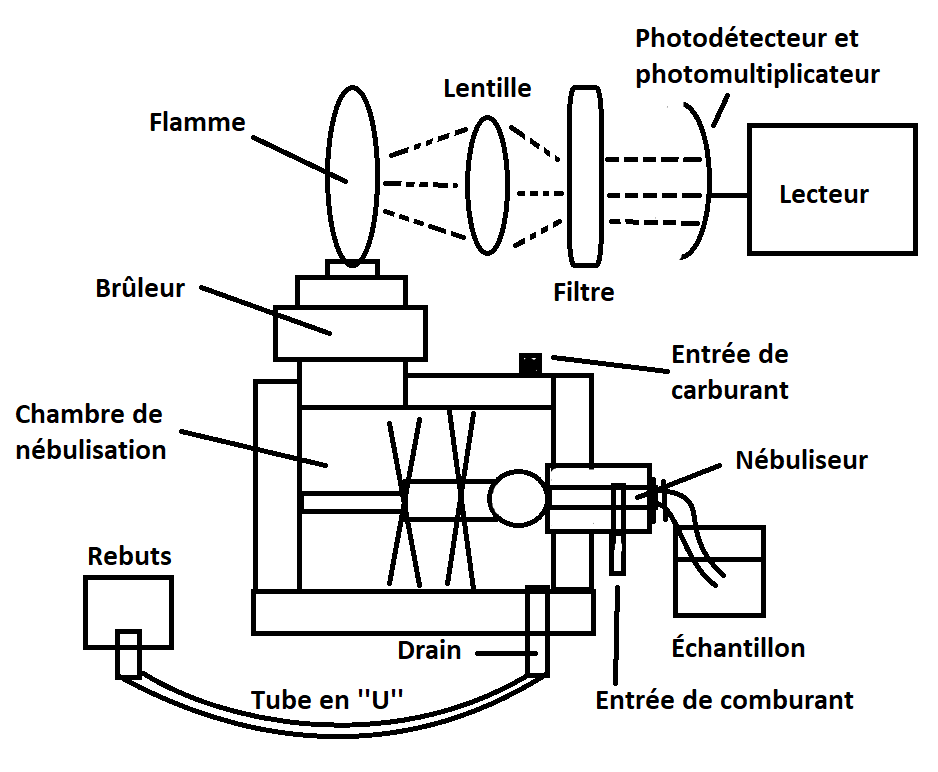 Photomètre de flamme